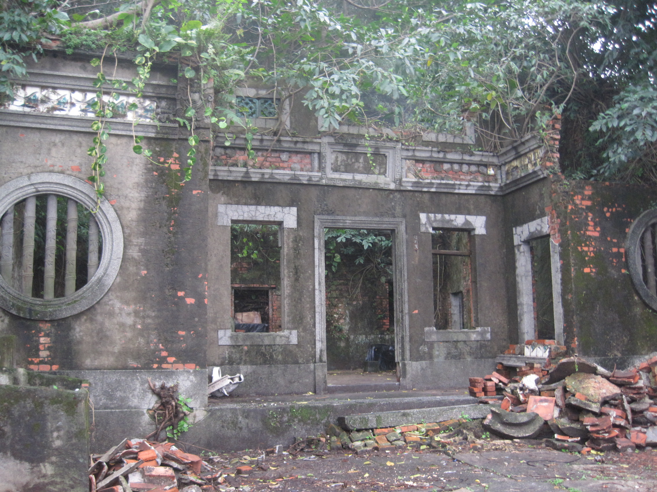 許梓桑故居是基隆市文化資產。